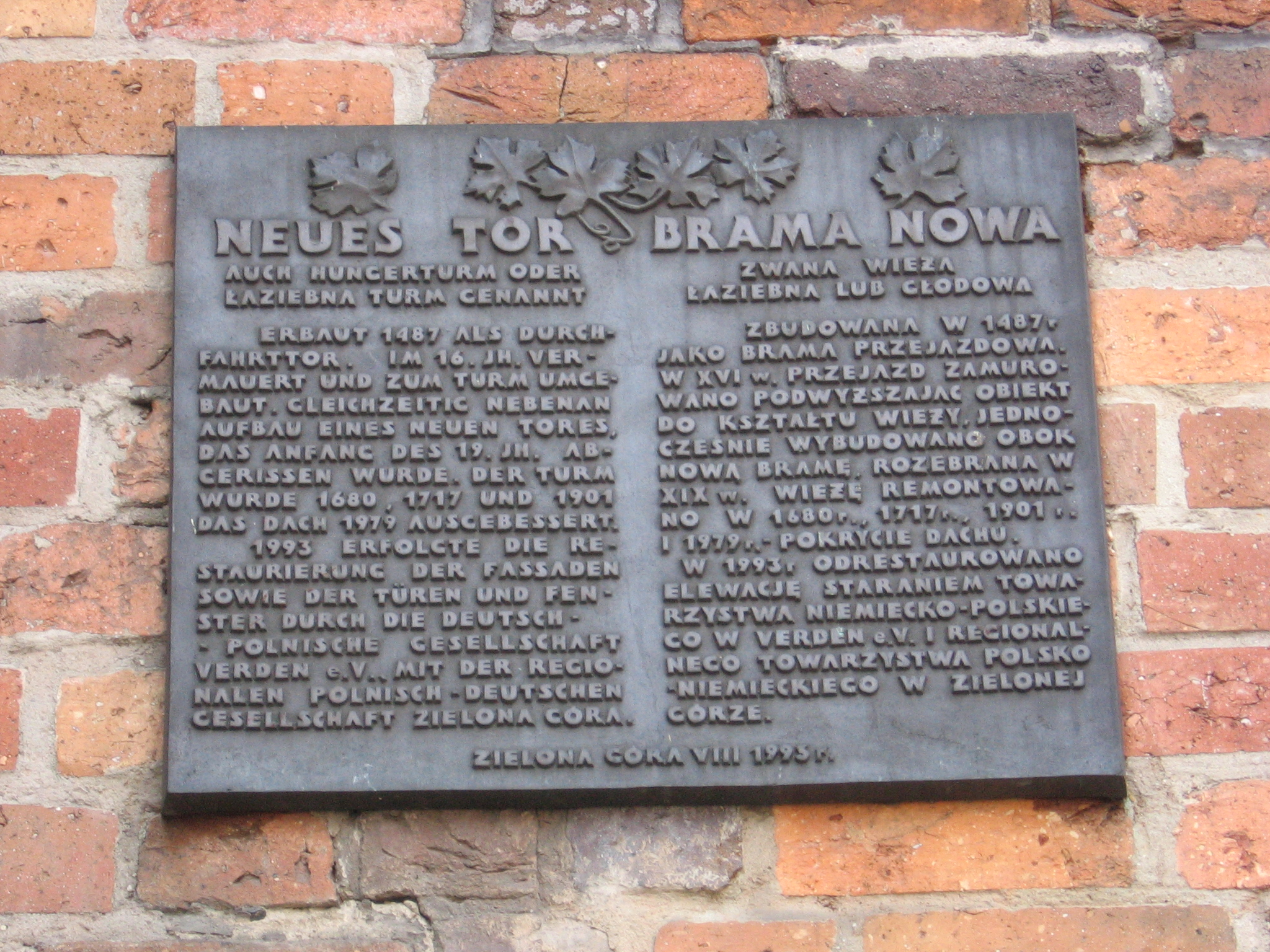 Zielona Góra, Tablica informacyjna na Wieży Łaziennej